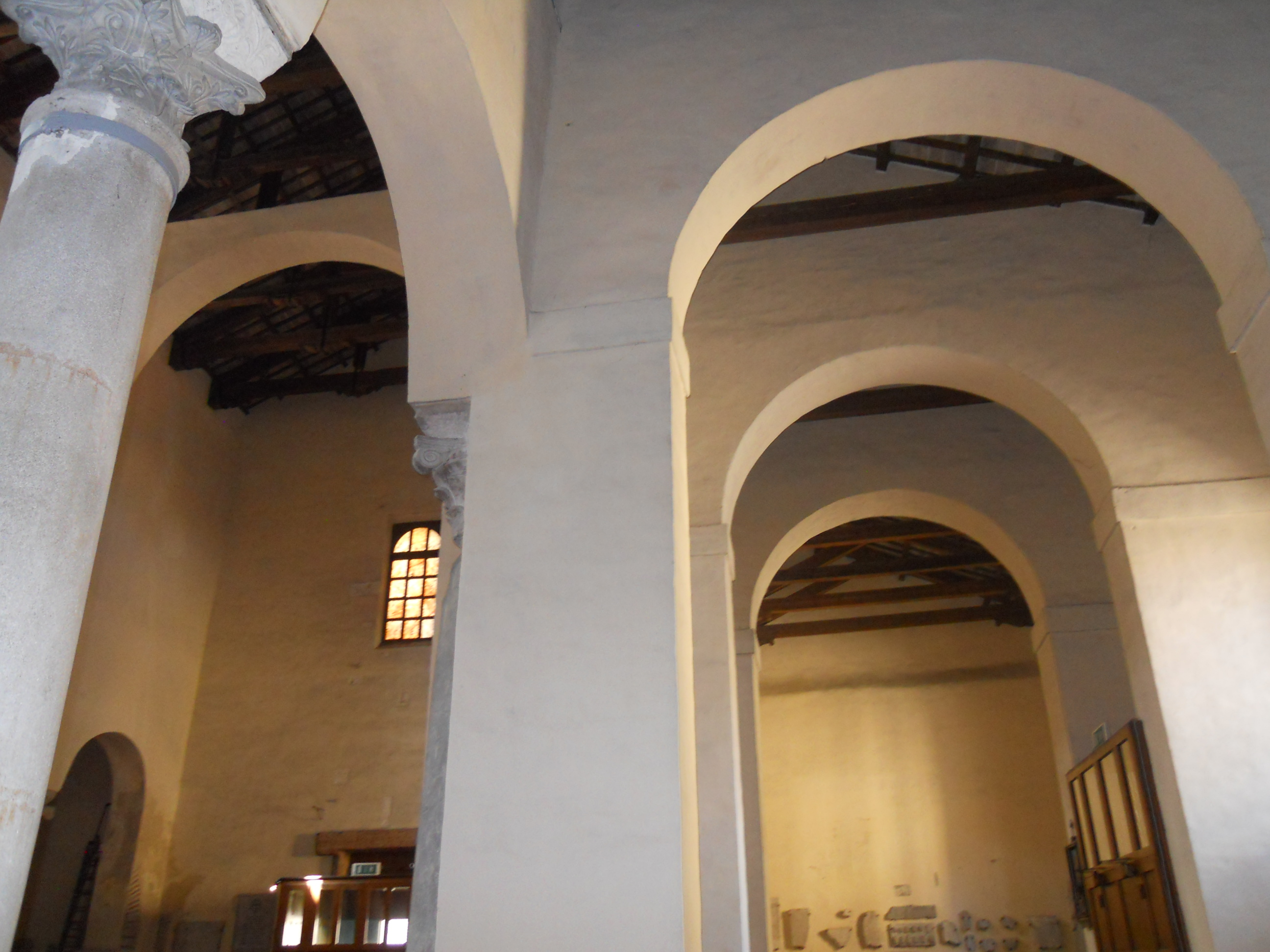 I tre archi di sostegno, costruiti dell'Ottocento, della navatella sinistra della Basilica di Sant'Agata Maggiore in Ravenna.